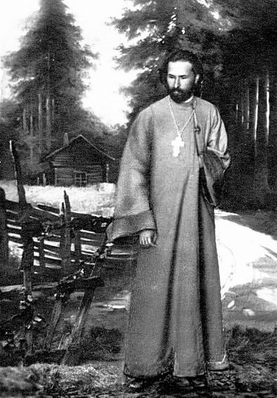 Георгий Аполлонович Гапон (1870-1906) на фоне дачи в Озерках. Коллаж неизвестного художника. Опубликован в книге А. Филиппова «Странички минувшего. О Гапоне», Спб., 1913 г.